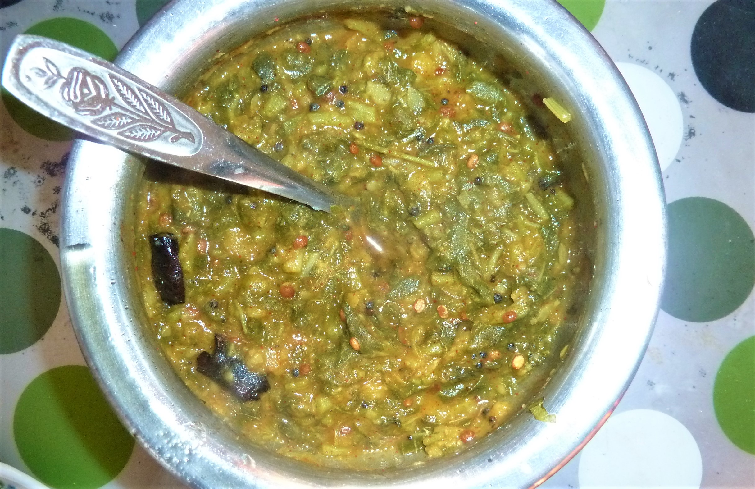 తోటకూర పులుసు